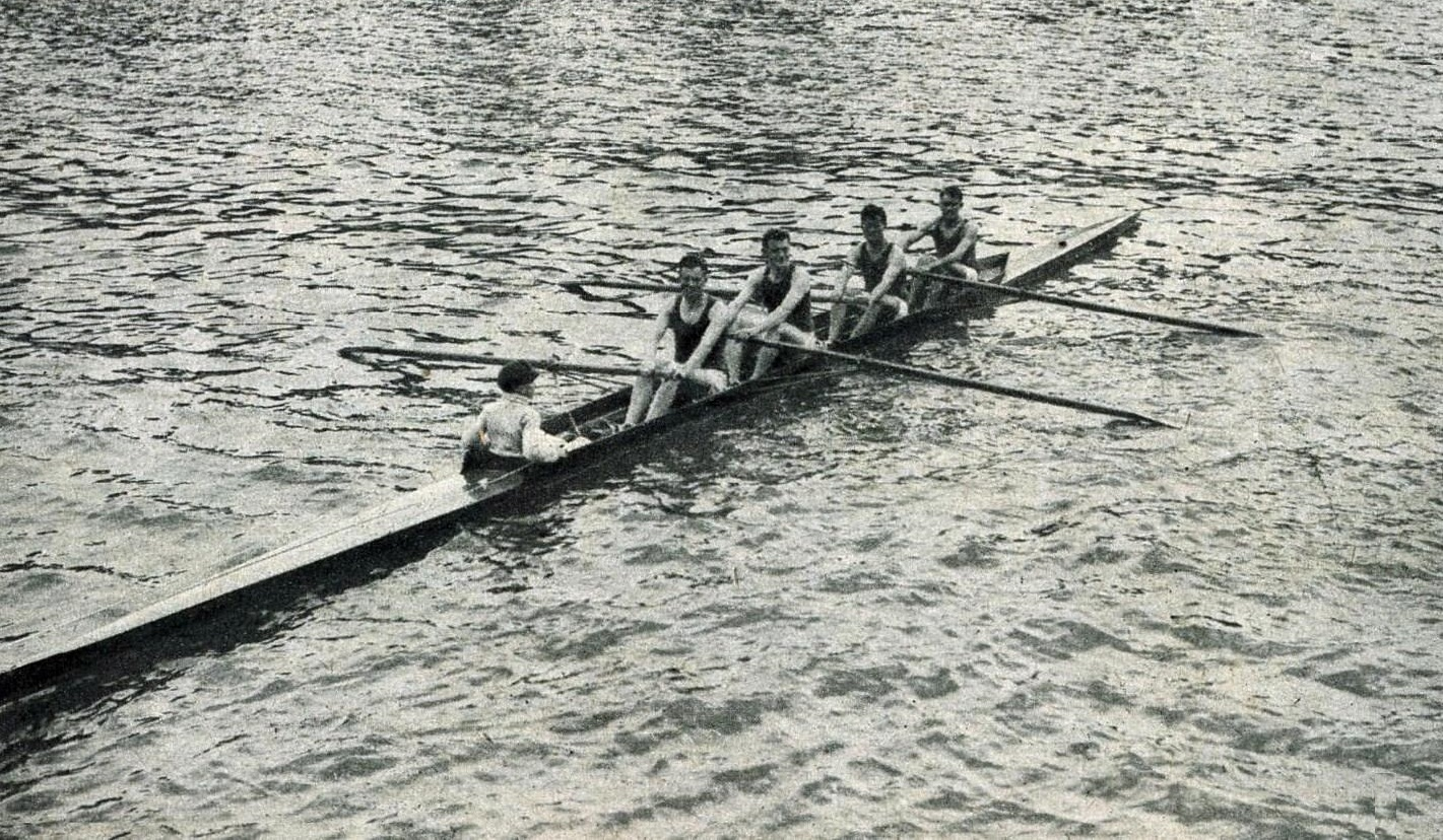 Le Quatre avec barreur du CA de Nantes en juillet 1936, de G. à D. Noël, Fernand et Marcel Vandernotte, puis Cosmat et Chauvigné.